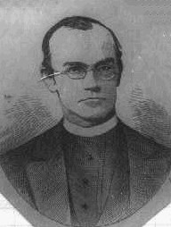 Vojtěch Křišťan (1839 - 1890), Český diplomat a duchovní.